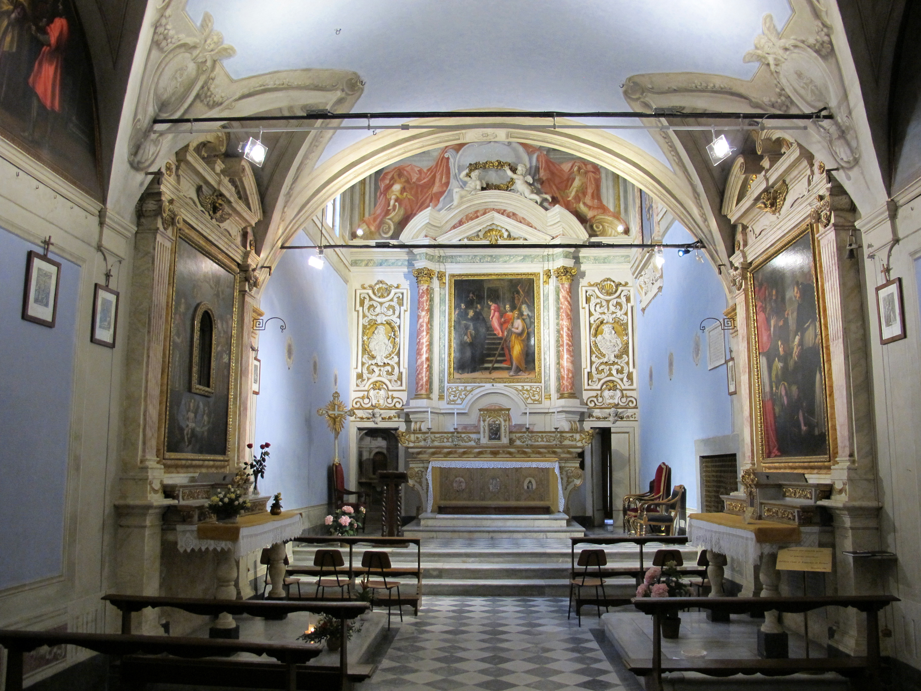 Santa maria degli angiolini, interno